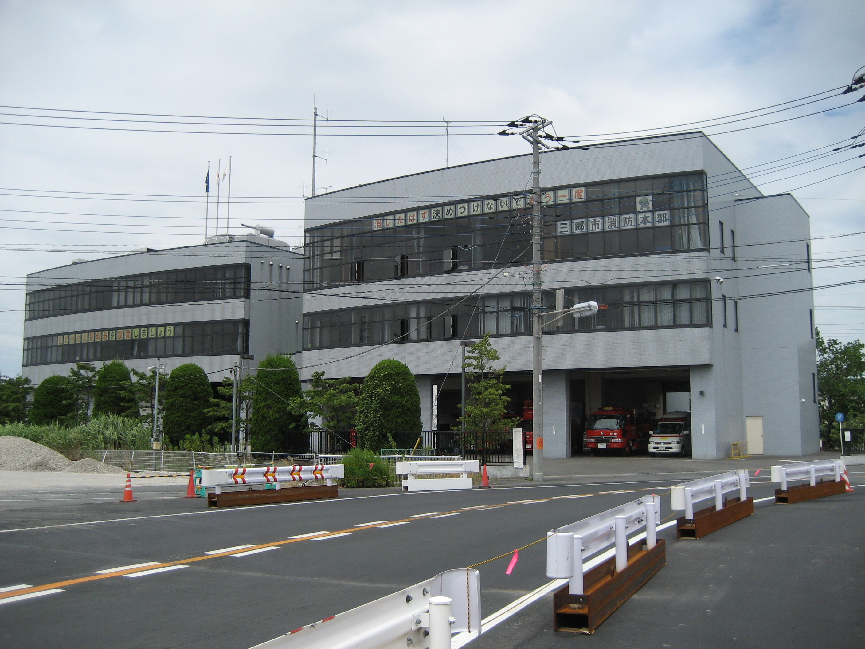 三郷市消防本部消防署庁舎